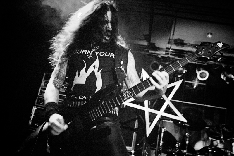 Azarath, Wrocław, Firlej, 6.09.2011